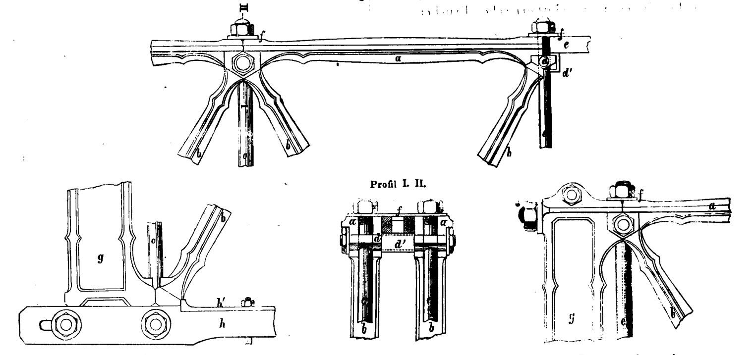 Wilhelm Bukowsky: Zeichnung der Schifkornschen Brücken